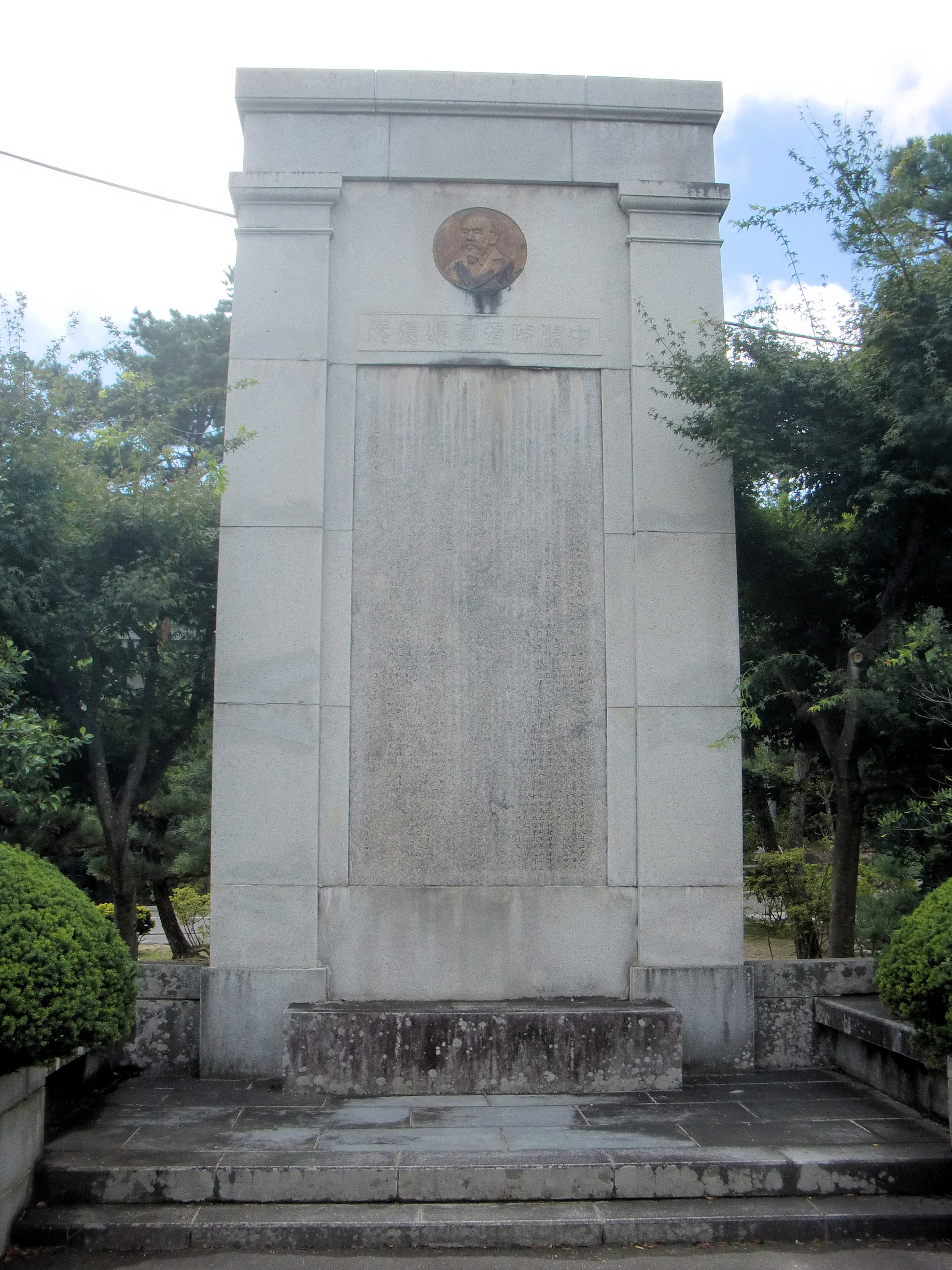 郡山市 開成山大神宮 境内 安積開拓功労者 中條政恒 頌徳碑